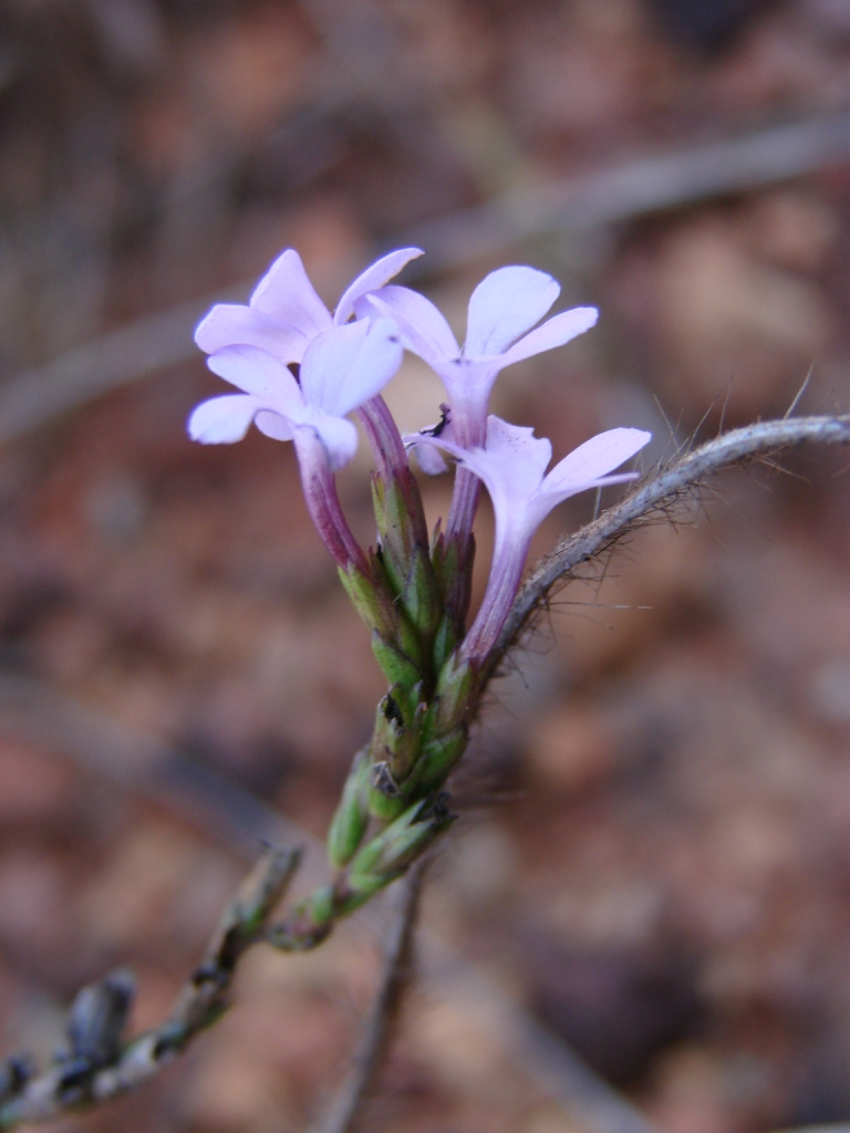 Buchnera juncea Cham. & Schltdl. - OROBANCHACEAE - Parque Nacional de Brasília - Brasília - Distrito Federal - Brasil.